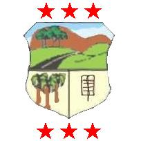 Escudo de la Municipalidad y Ciudad de Ñemby, Paraguay.